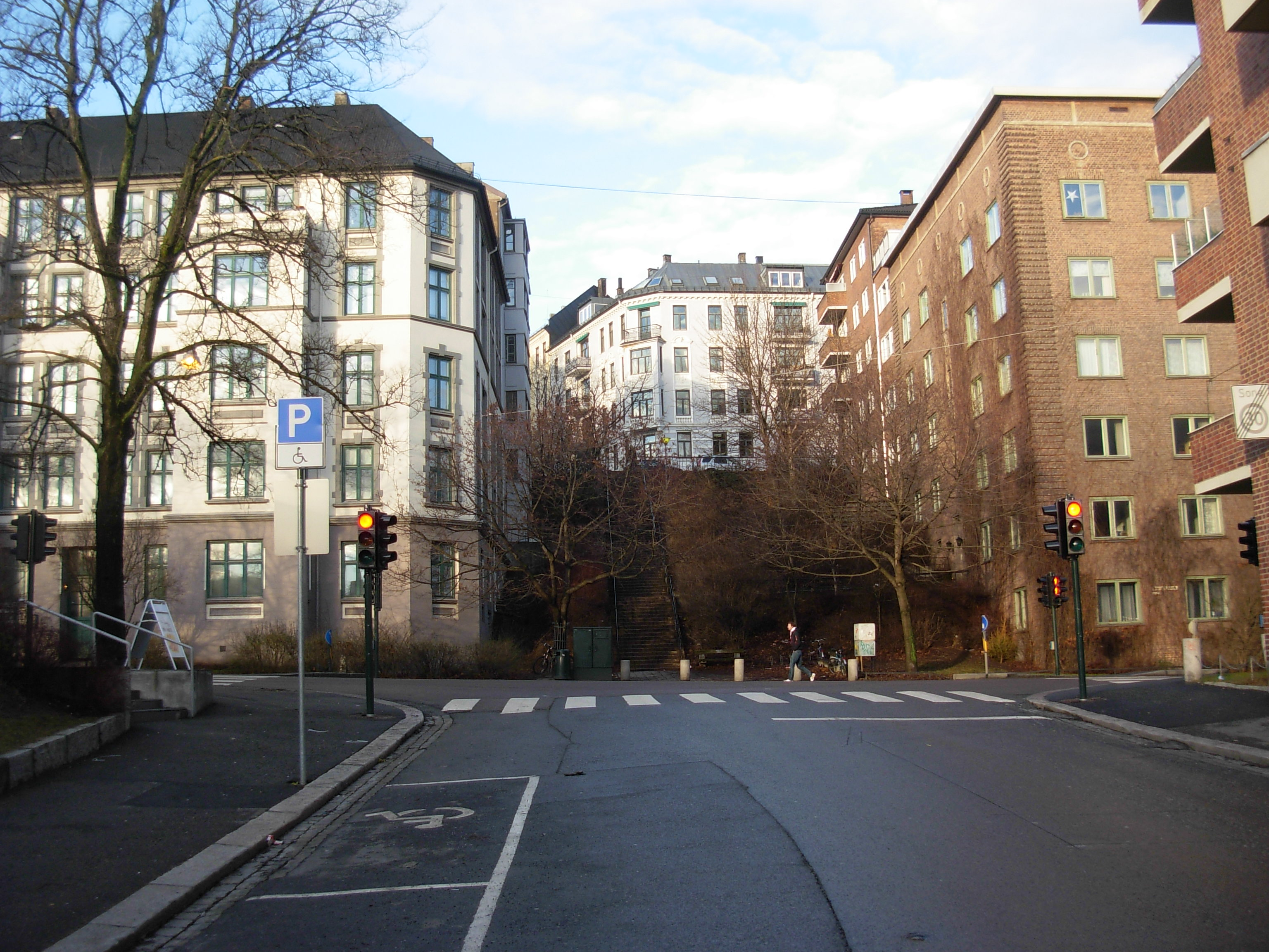 Brandts gate, Ila, Oslo